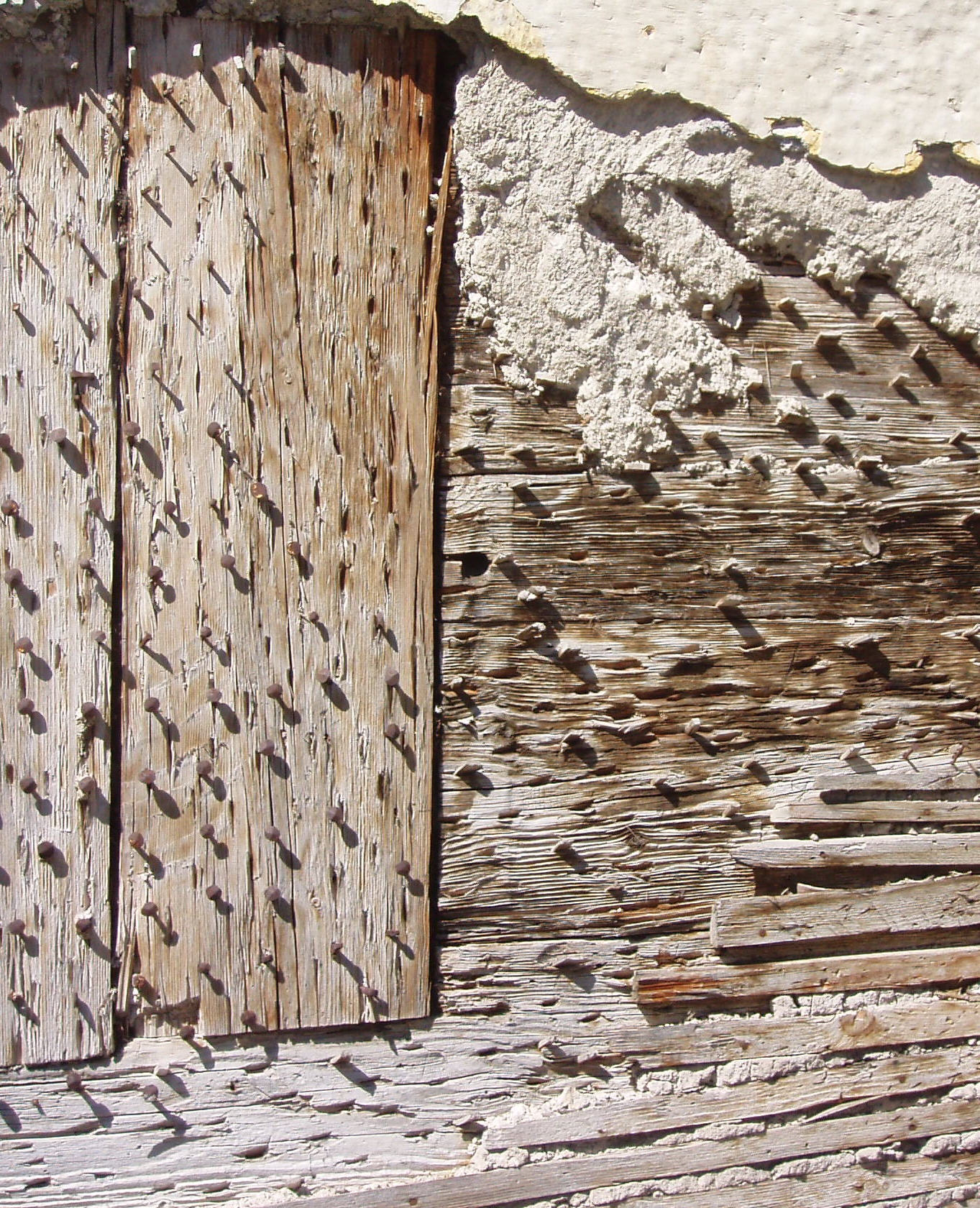 Möggenriedhaus in Sonthofen